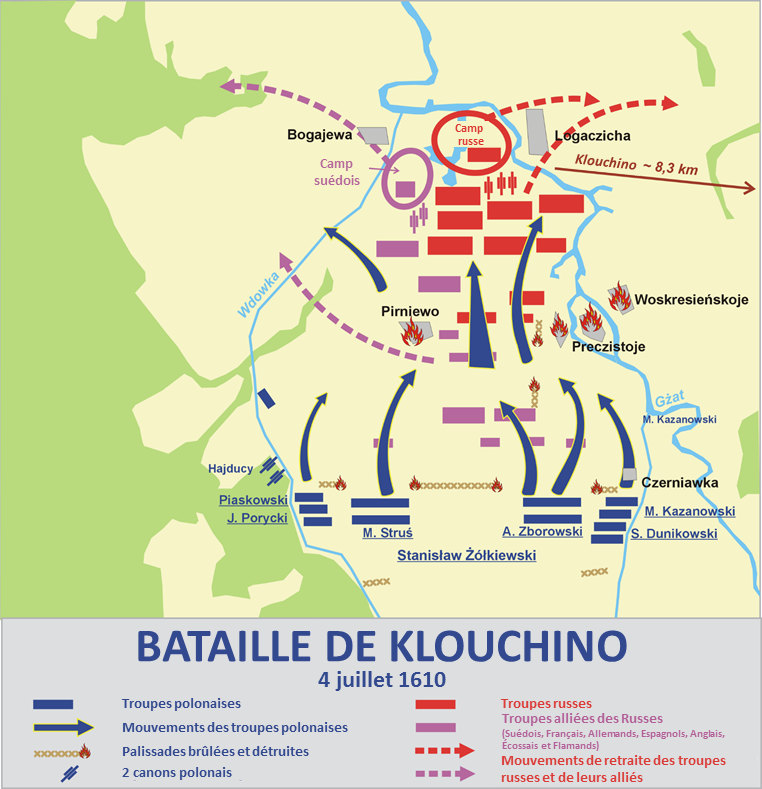 Traduction du polonais au français du schéma de la bataille de klouchino